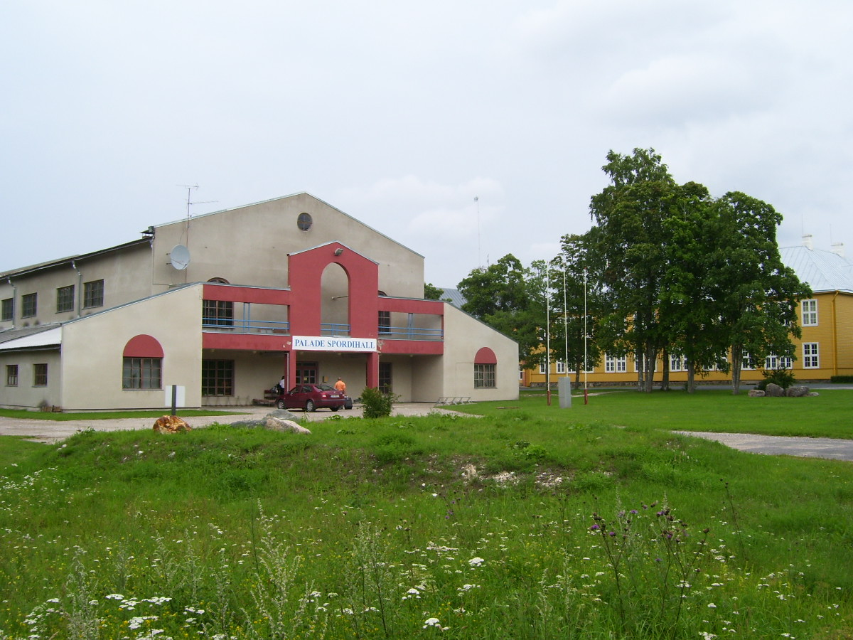 Palade spordihall, tagaplaanil kool; Palade küla, Pühalepa vald